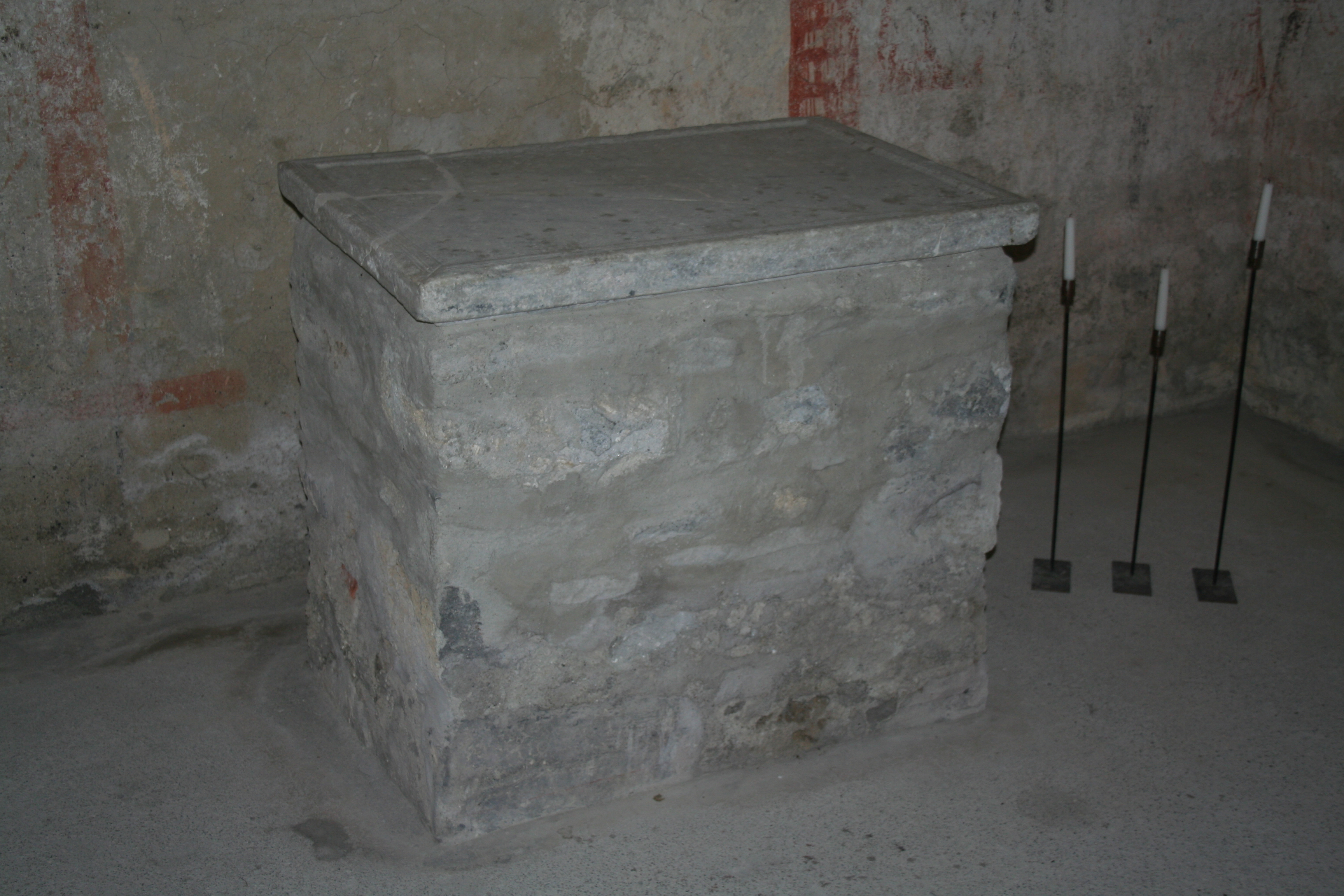 Altar in der Kapelle St. Lorenz